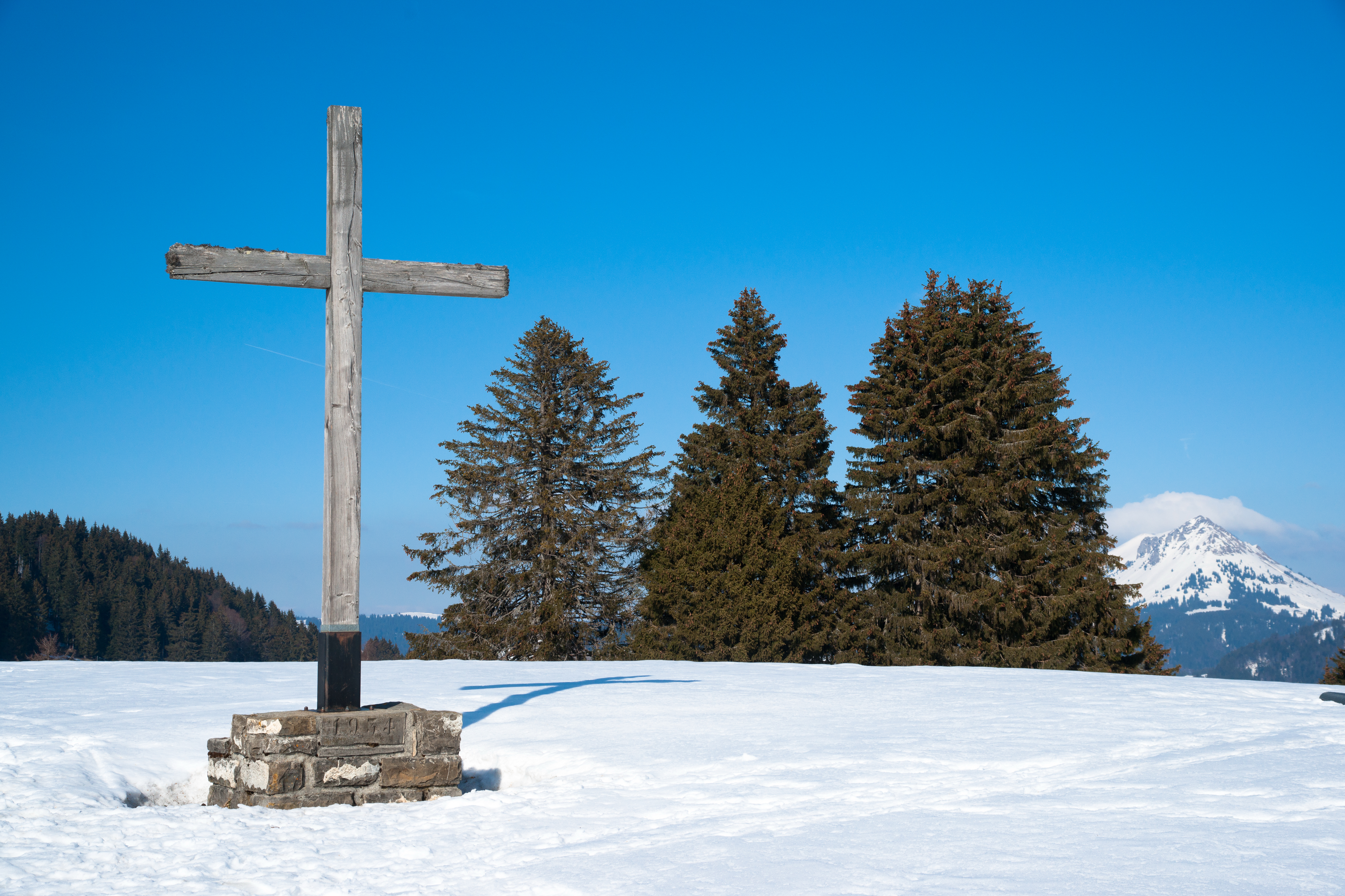 Les Pléiades, sommet des préalpes suisses au-dessus de Vevey, (1 360 mètres d'altitude), dans le canton de Vaud.